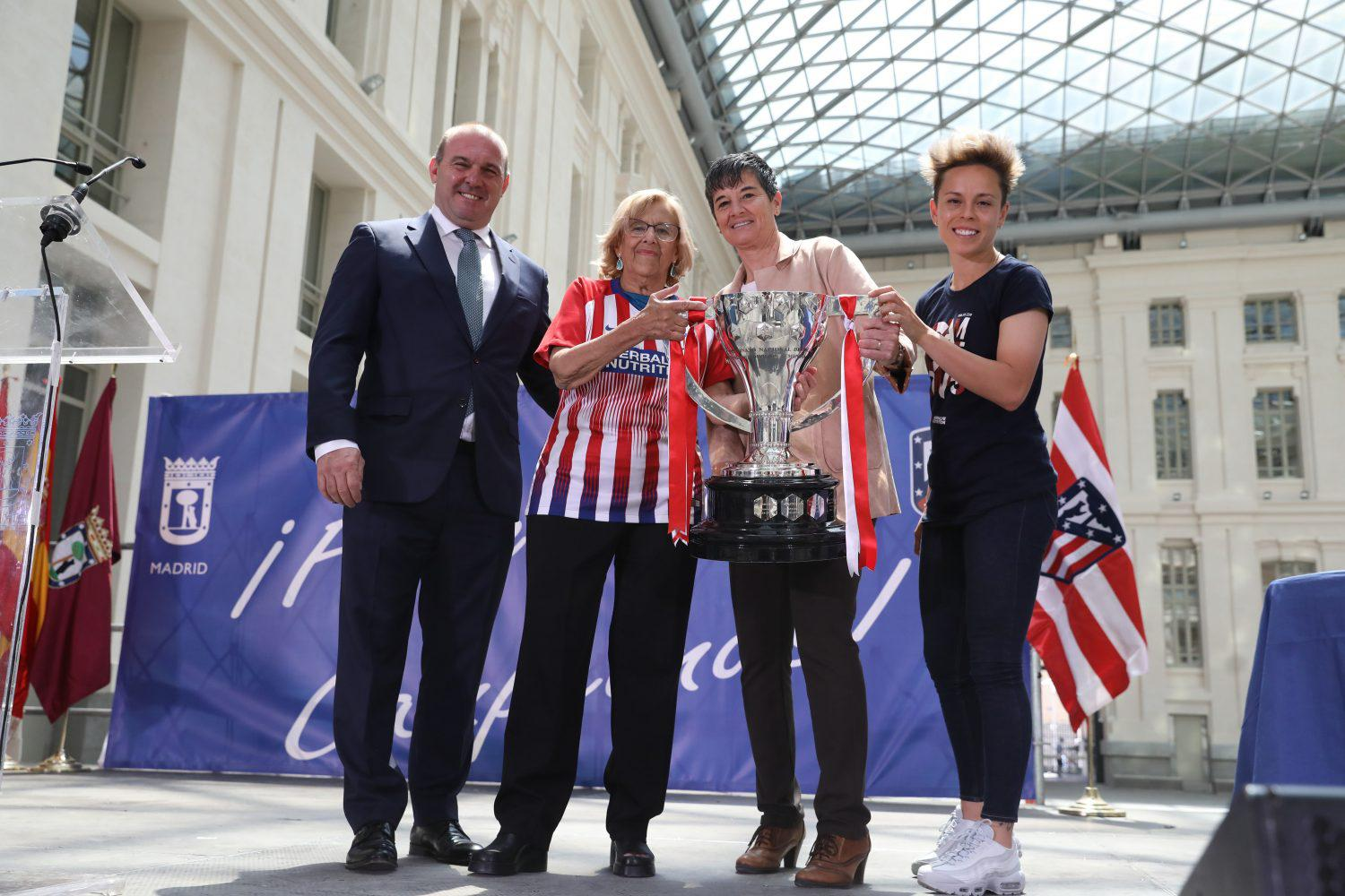 La alcaldesa de Madrid, Manuela Carmena, ha recibido hoy en el Ayuntamiento de Madrid al equipo de fútbol femenino del Atlético de Madrid, campeón de la Liga Iberdrola 2019, en un acto muy emotivo en el que ha felicitado a los integrantes del club y a todas las jugadoras agradeciendo su esfuerzo y la grandeza del logro deportivo. “Habéis ganado la liga. Habéis ganado Madrid. Habéis ganado nuestro corazón, porque os queremos mucho”, subrayó la alcaldesa, que ha recibido una camiseta oficial del equipo homenajeado.